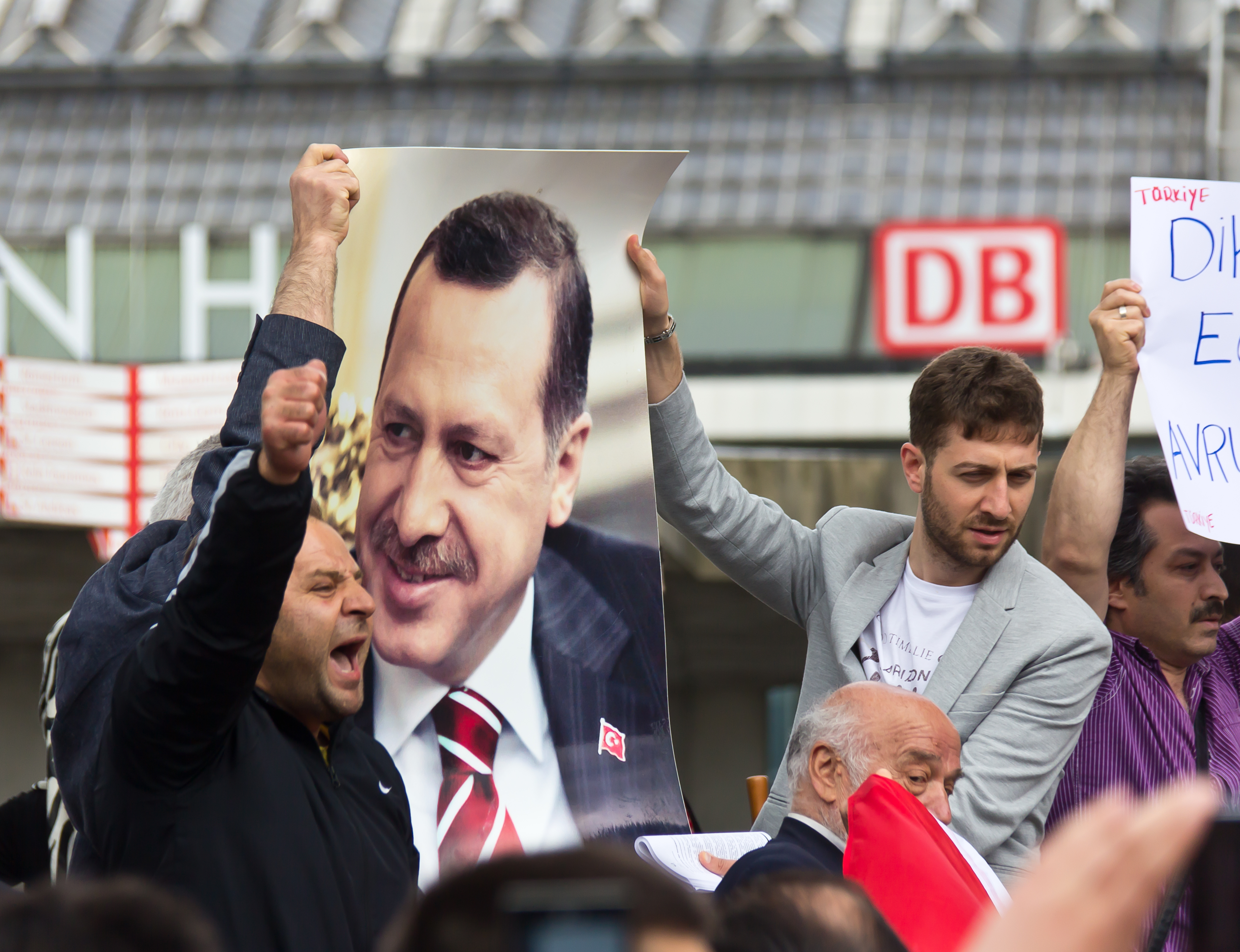 Kundgebung des Union Europäisch-Türkischer Demokraten (UETD) e.V. in Köln auf der Domplatte. Thema: „Aktuelle Ereignisse in der Türkei“